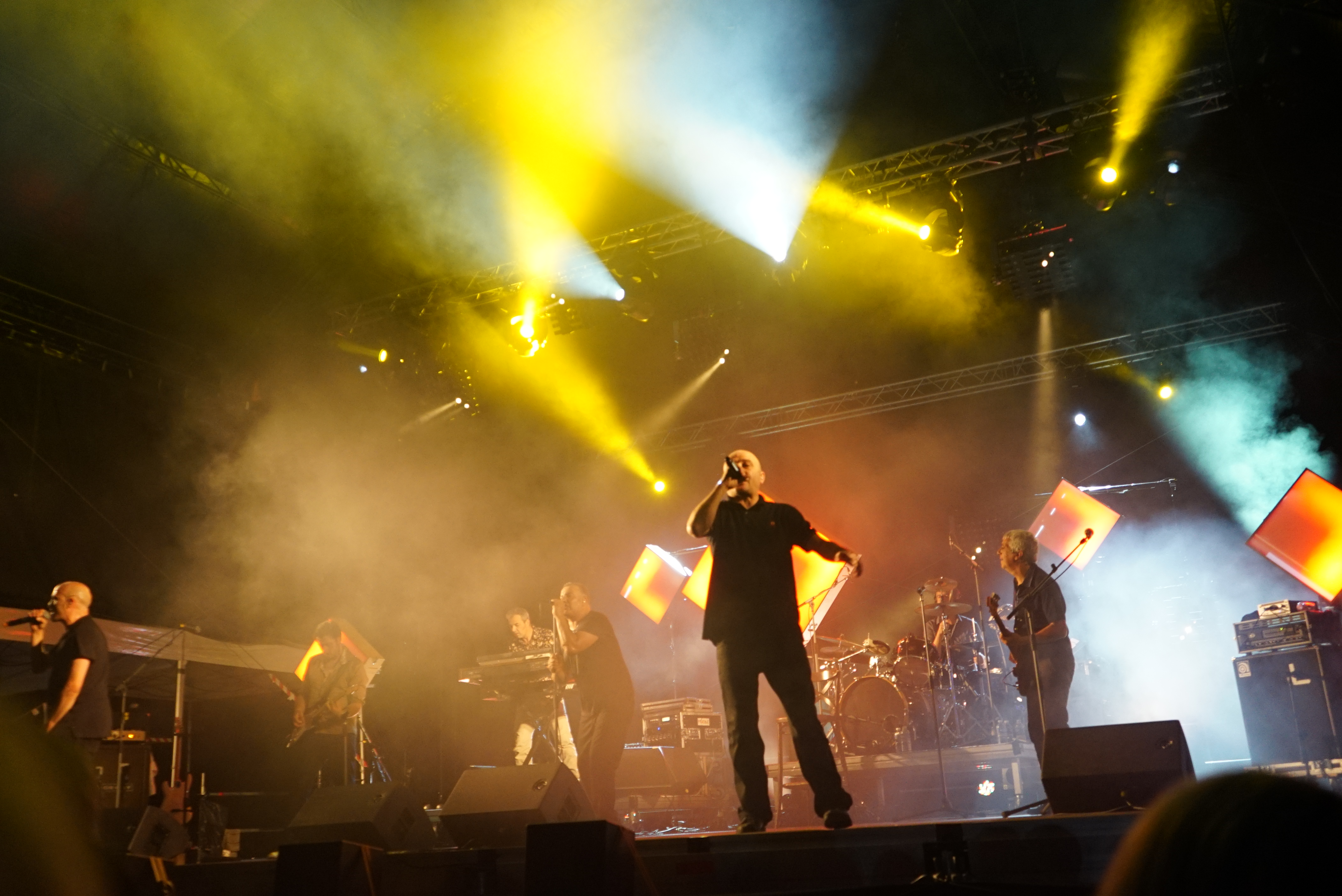 lors de Un été dans l'Aisne 2015 à Laon.